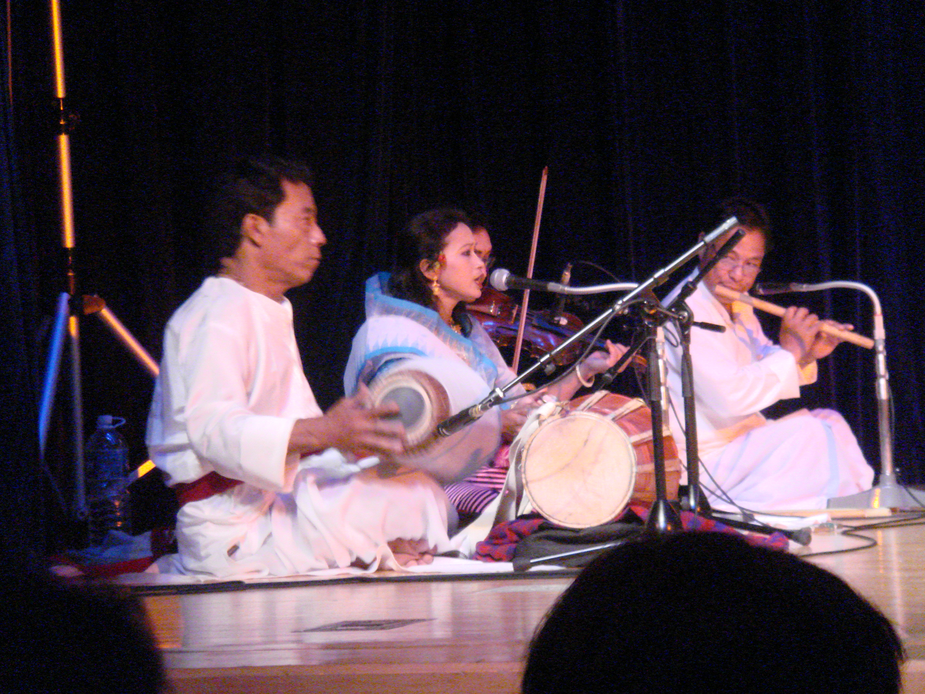 classical Indian dance drama, Manipur